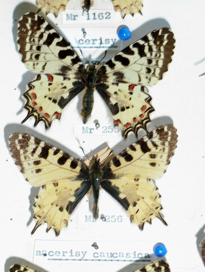 Allancastria caucasica